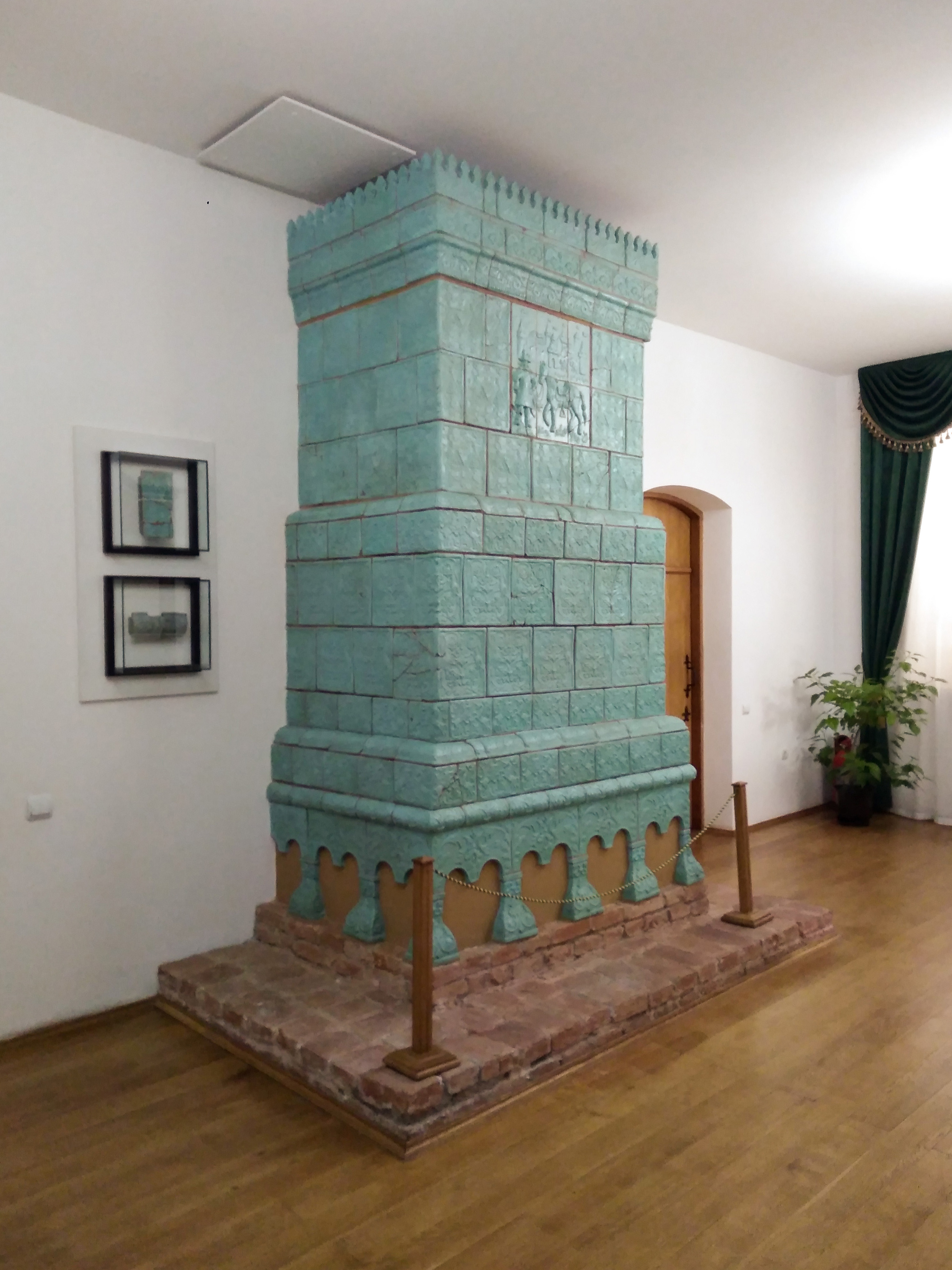 Будинок Кочубея В.Л. – генерального судді Лівобережної України в 1699-1708рр. (мур.), Батурин, вул.Гетьманська, 70